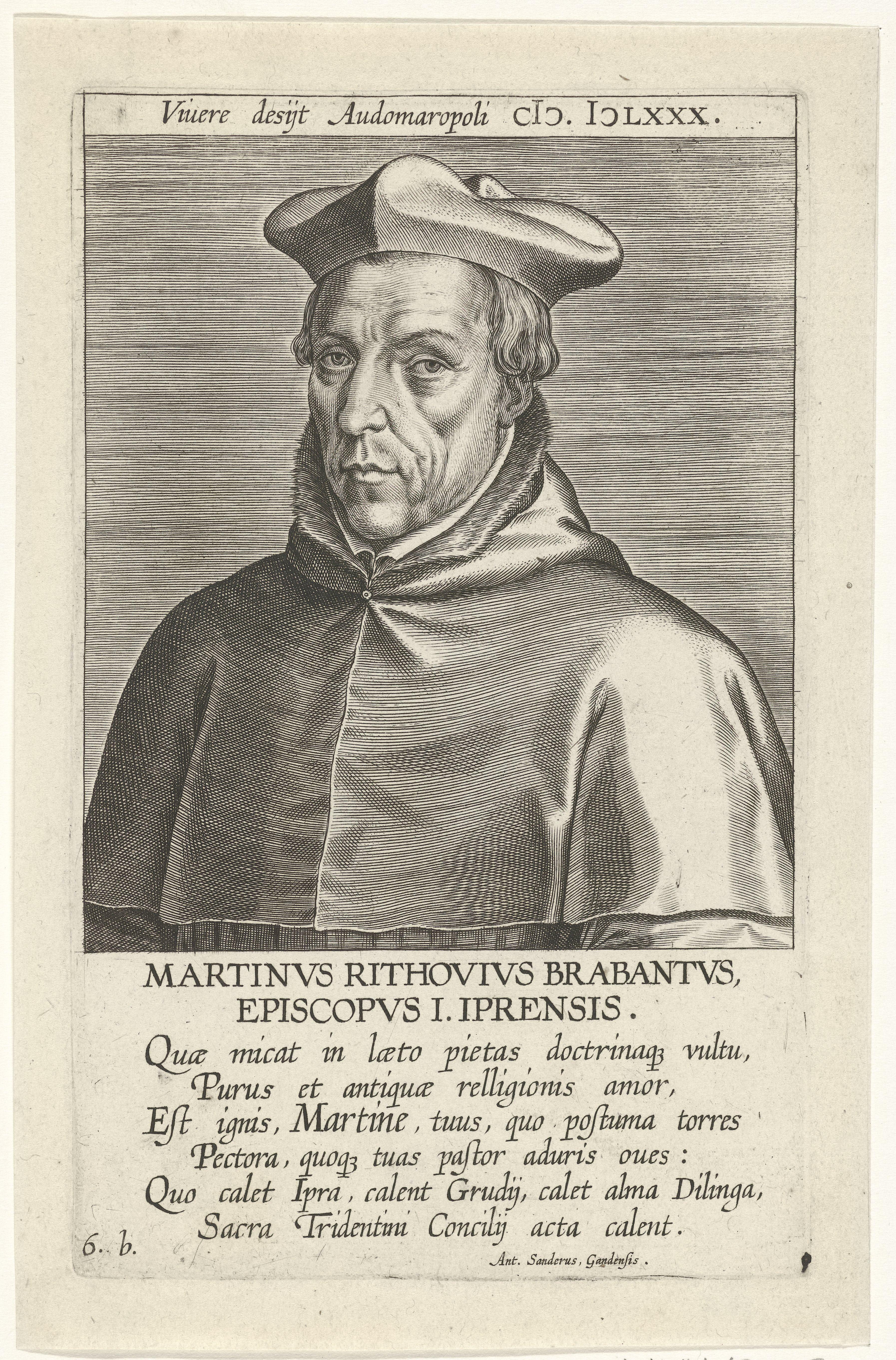 IdentificatieTitel(s): Portret van Martinus RythoviusMartinvs Rithovivs Brabantvs (titel op object)Portretten van beroemde Nederlandse en Vlaamse geleerden (serietitel)Illustrium Galliae Belgicae scriptorum icones et elogi (serietitel)Objecttype: prent Serienummer: 7/57Objectnummer: RP-P-1906-683Catalogusreferentie: New Hollstein Dutch fig. 42-1(2)Opschriften / Merken: verzamelaarsmerk, verso midden onder, gestempeld: Lugt 2228Omschrijving: Portret van Martinus Rythovius, de bisschop van Ieper. Buste naar links. Genummerd 6b. De prent heeft een Latijns boven- en onderschrift en maakt deel uit van een serie van beroemde Nederlandse en Vlaamse geleerden.VervaardigingVervaardiger: prentmaker: Philips Galle (toegeschreven aan atelier van)schrijver: Antonius Sanderus (vermeld op object)uitgever: Theodoor GallePlaats vervaardiging: AntwerpenDatering: 1608Fysieke kenmerken: gravureMateriaal: papier Techniek: graveren (drukprocedé)Afmetingen: plaatrand: h 175 mm × b 108 mmOnderwerpWie: Martinus RythoviusVerwerving en rechtenVerwerving: aankoop 1906Copyright: Publiek domein